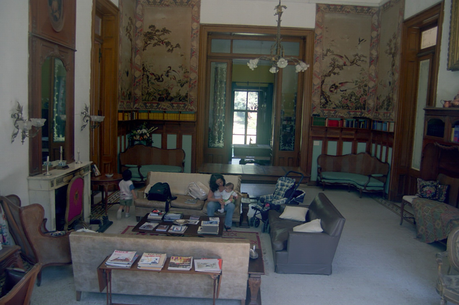 Sala de estar del casco de la estancia La Oriental, en Junín, Argentina.